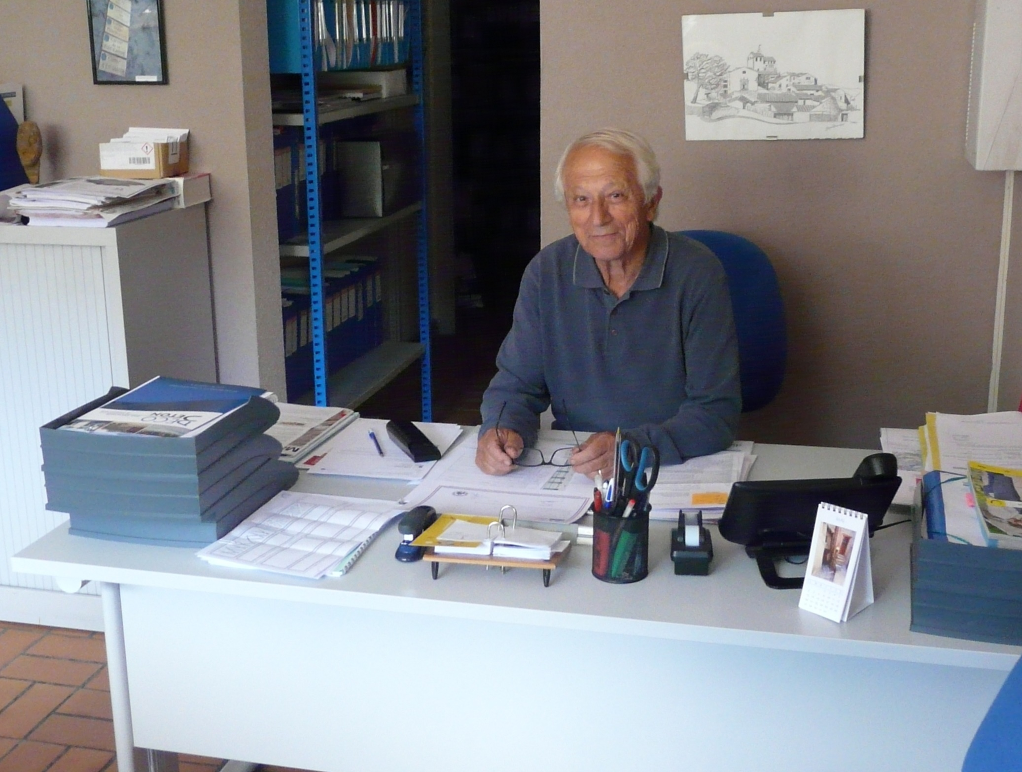 Jean Peyrou, batlle de Bulaternera